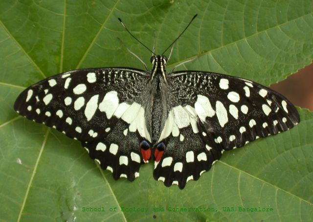 Papilio demoleus adult, India